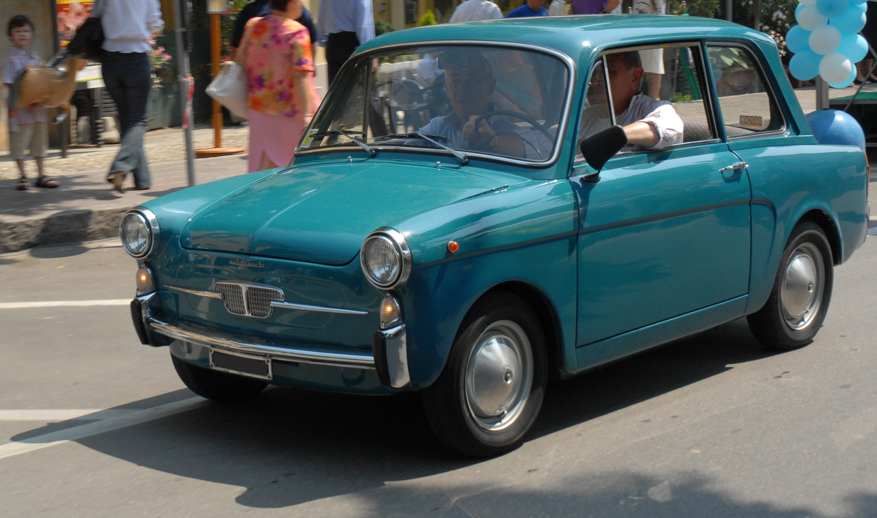 Autobianchi Bianchina at 2° Raduno Auto Storiche Città di Stradella (Pavia), 22 June 2008.